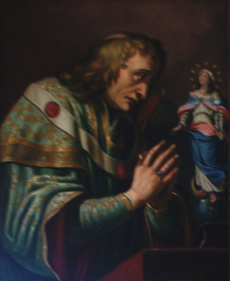 Porträtgemälde von Sixtus von Tannberg, Fürstbischof von Freising, im Fürstengang zwischen Fürstbischöflicher Residenz und Freisinger Dom.